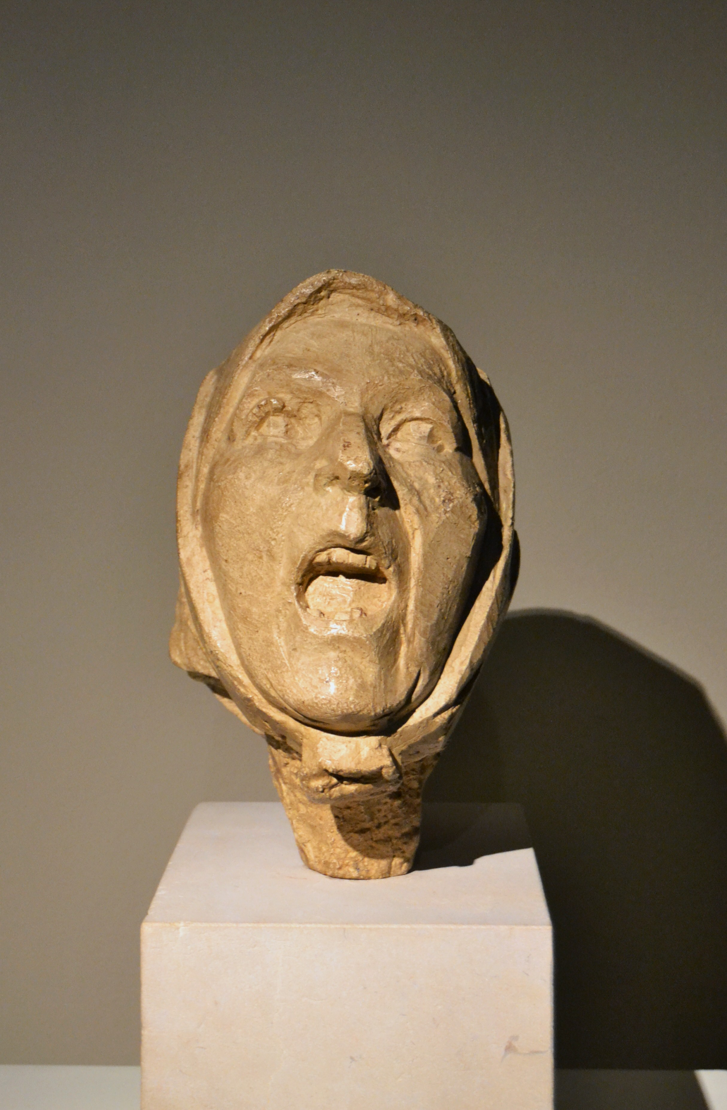 Cap de Montserrat cridant (Tête de Montserrat criant), 1942, Julio González. Guix, 32 x 20 x30 cm. Institut Valencià d'Art Modern.